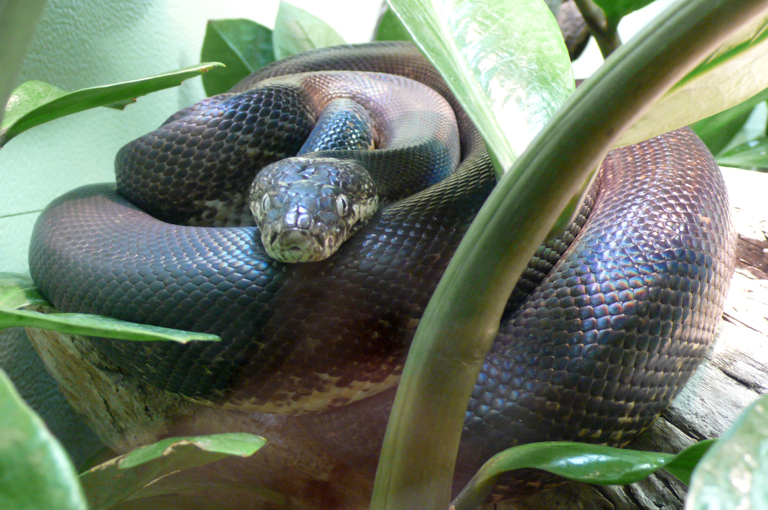 Savu python (Liasis mackloti savuensis)